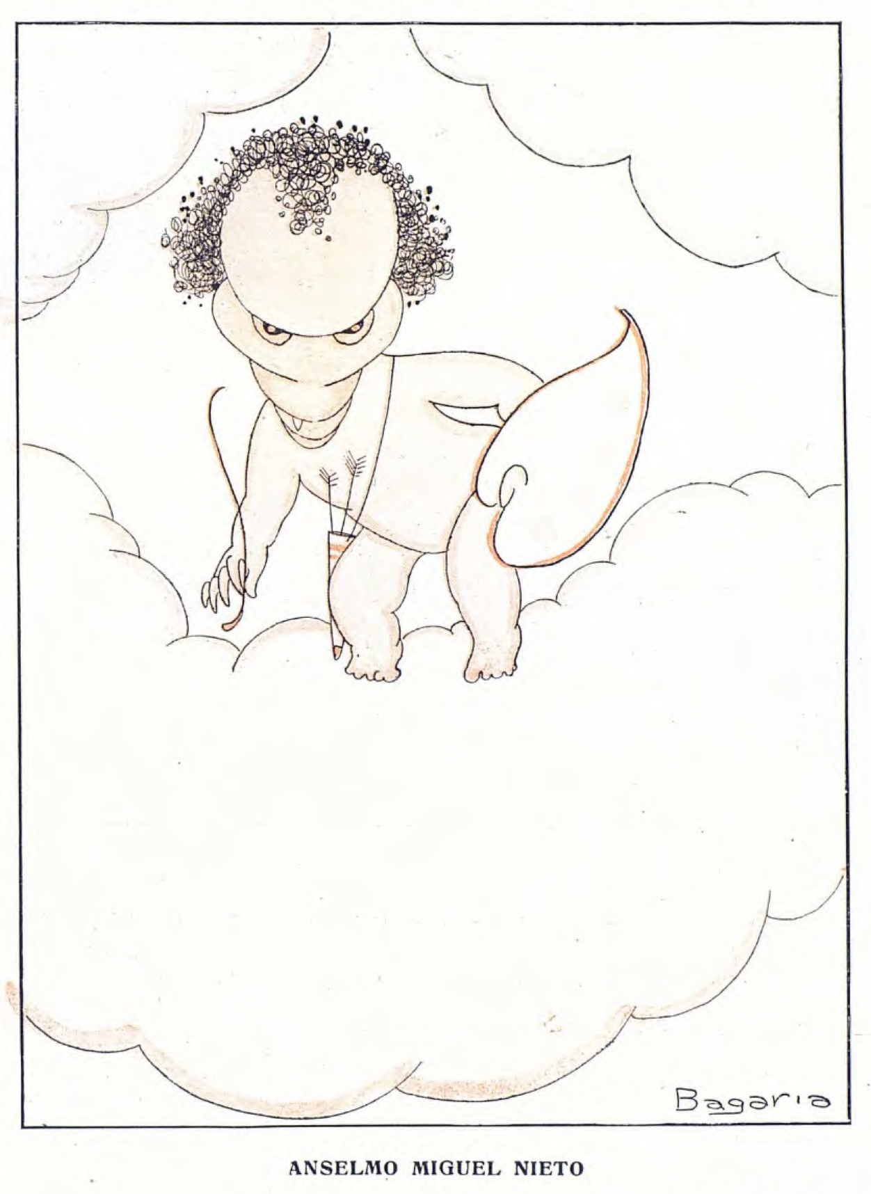 Anselmo Miguel Nieto.